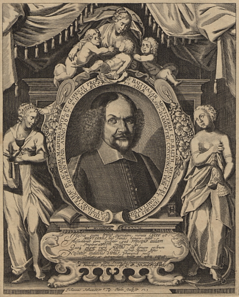 Prof. Balthasar Mentzer II., *11.05.1614 Gießen +28.07.1679 Darmstadt, Prof. der Theologie, Portrait: Kupferstich